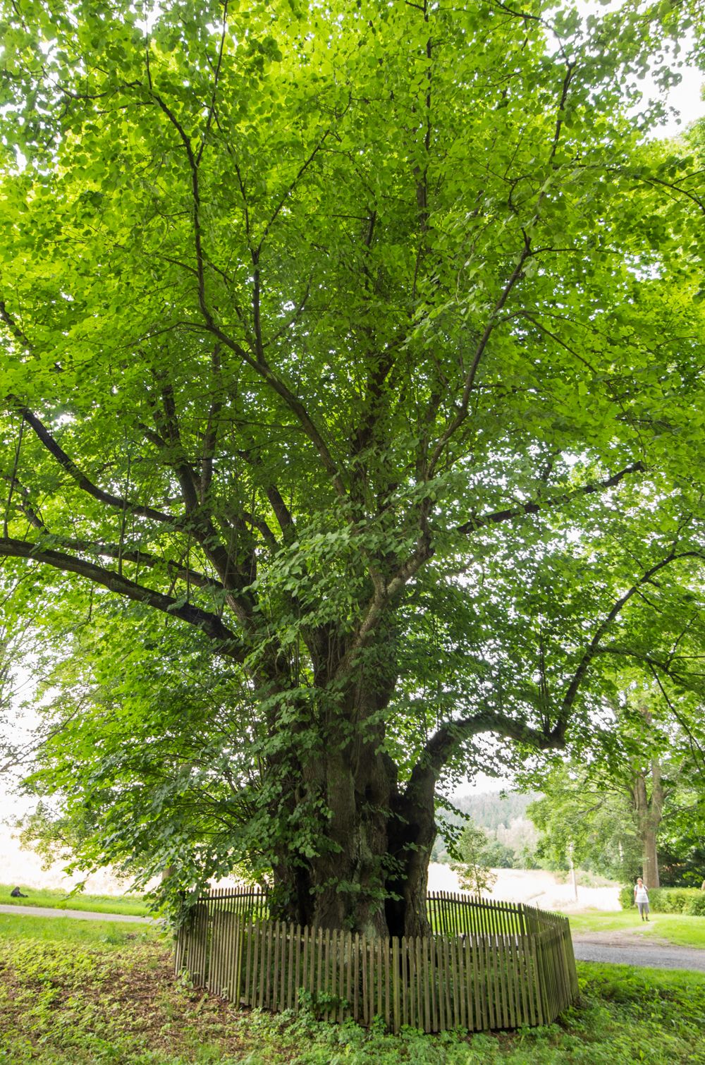 památný strom Lubská lípa, Horní Luby, okres Cheb